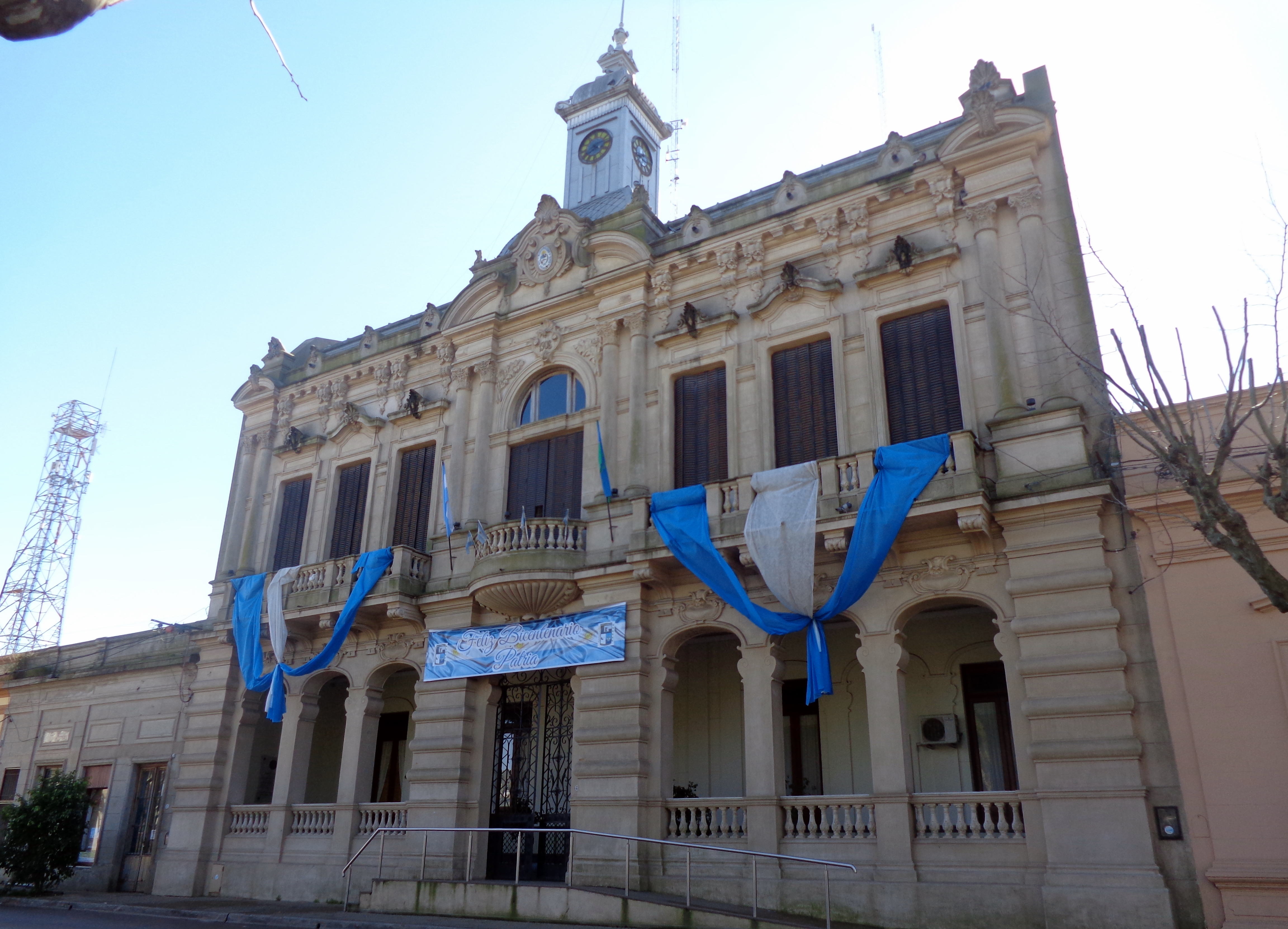 Municipalidad de San Andrés de Giles, dirección calle Moreno 338, provincia de Buenos Aires, Argentina